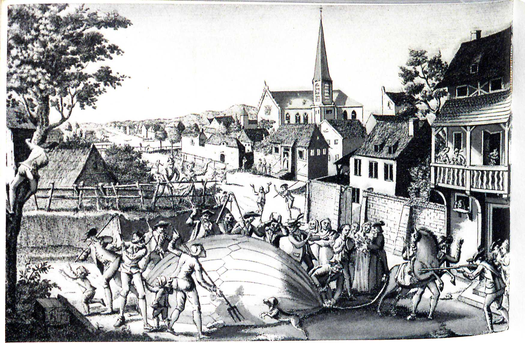 Jacques Charles Ballon 1783 Gonesse